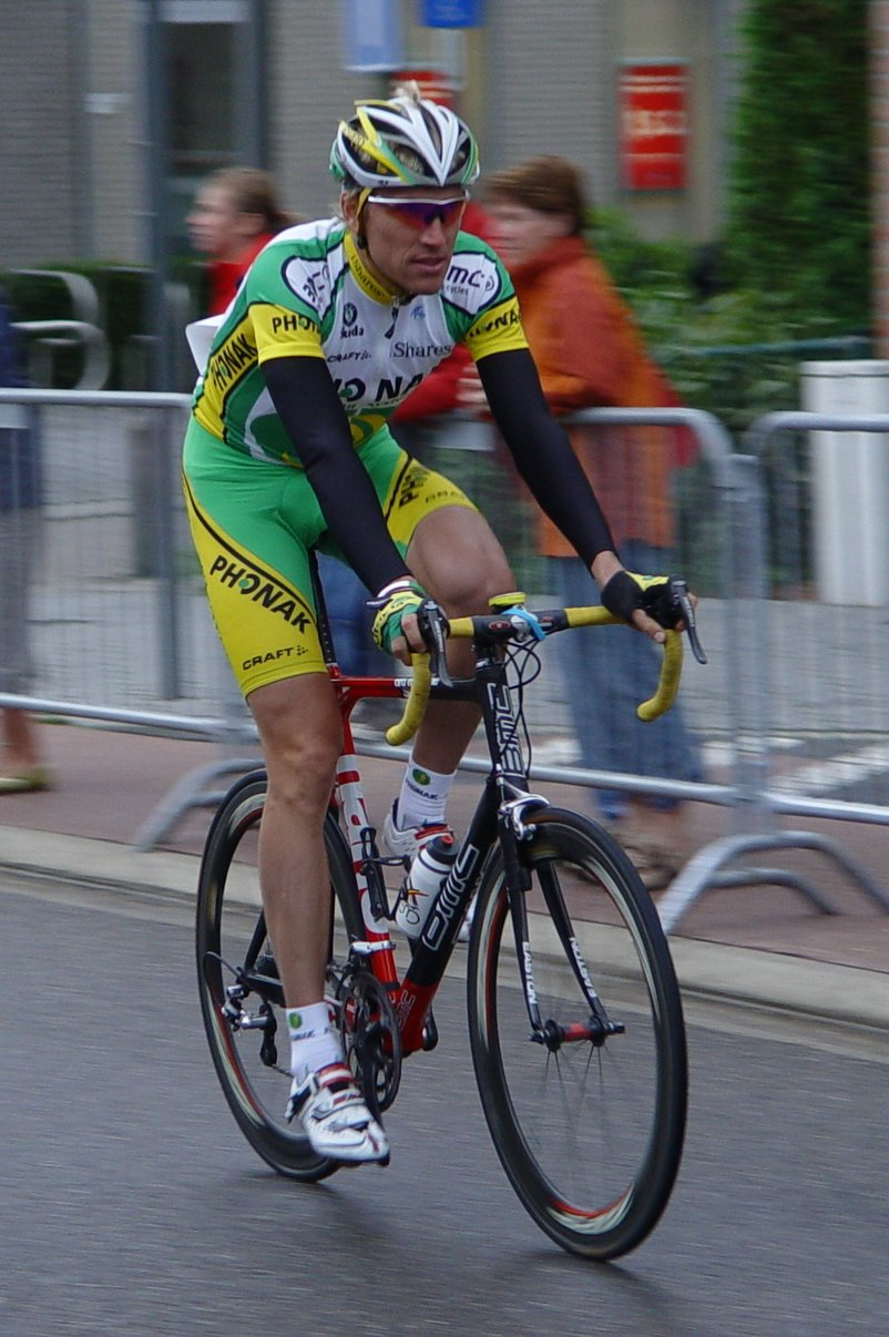 Axel Merckx in het na-Tour creterium van Lommel